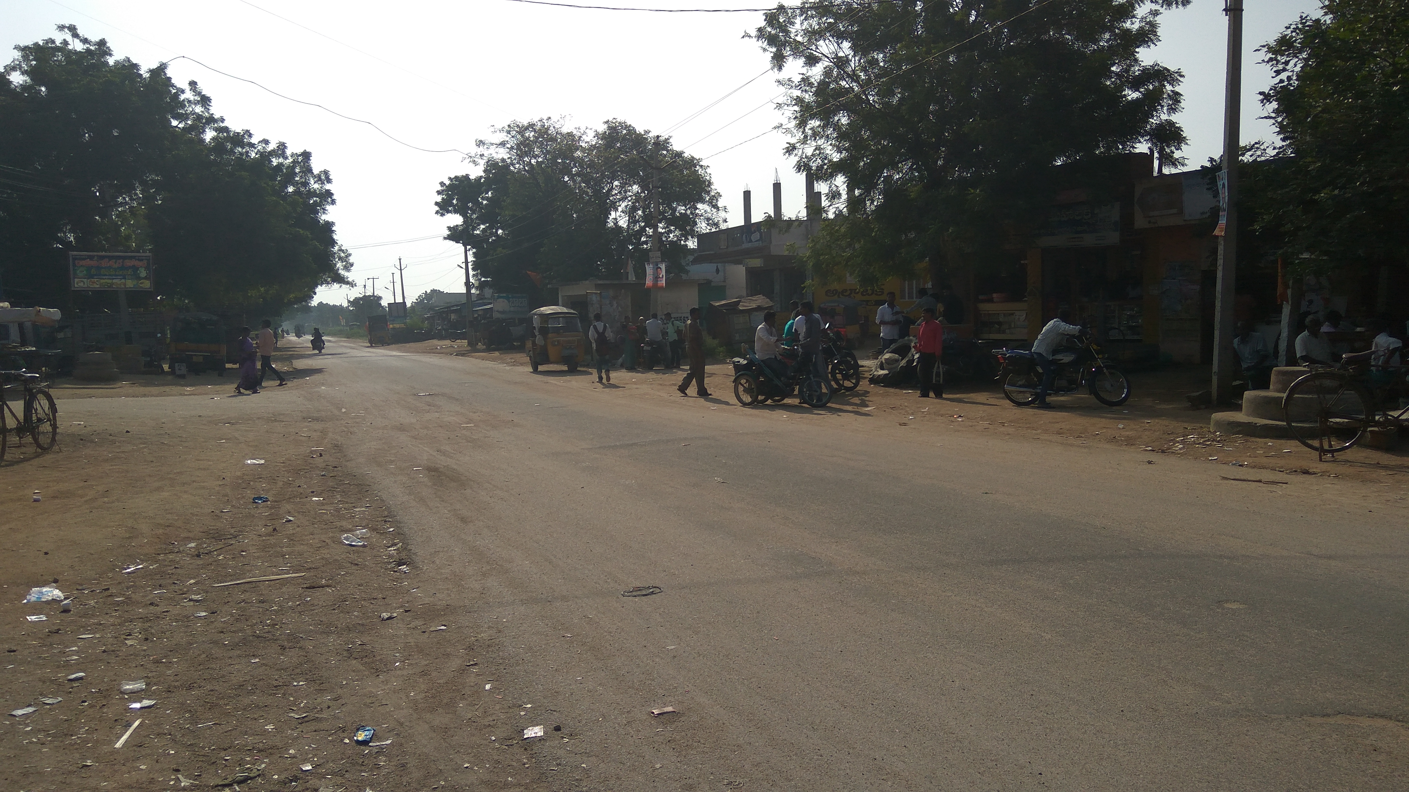 ముత్తిరెడ్డి గూడెం రోడ్డు